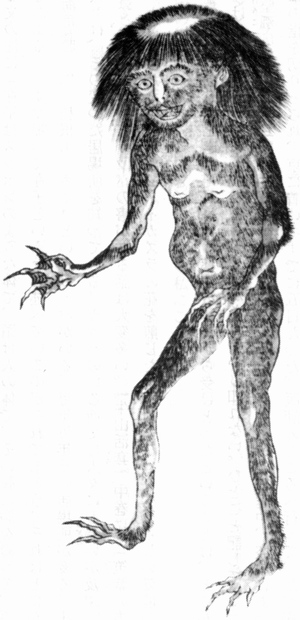 Neneko, Tonegawa-zushi (利根川図誌のネネコ)